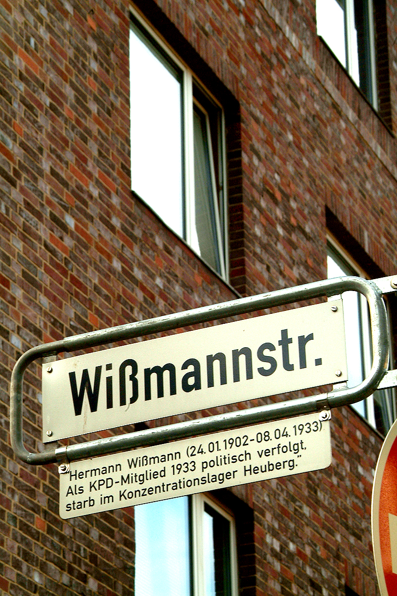 Zinnober-Kunstvolkslauf ...